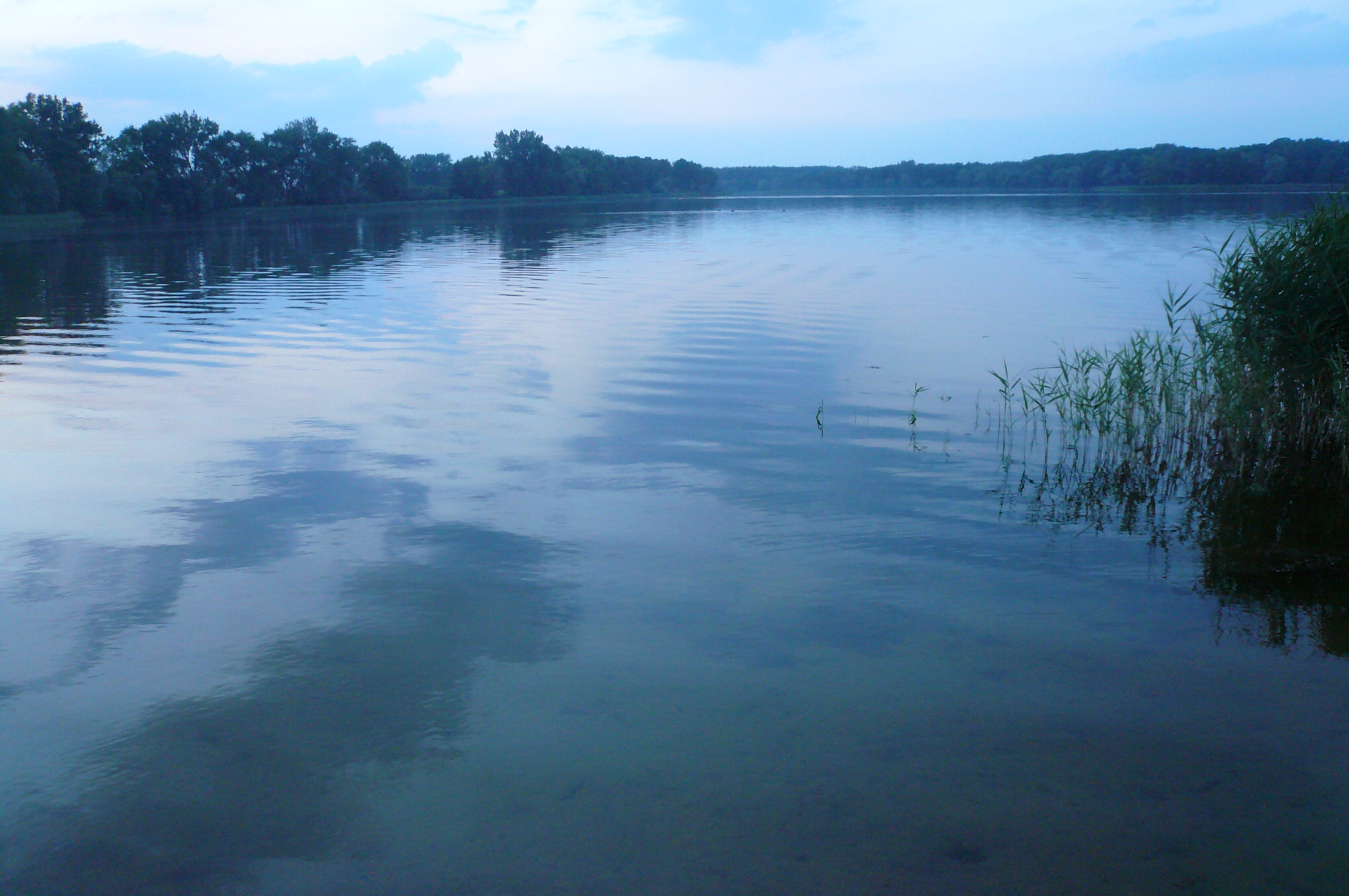 Jezioro Myśliborskie w Myśliborzu